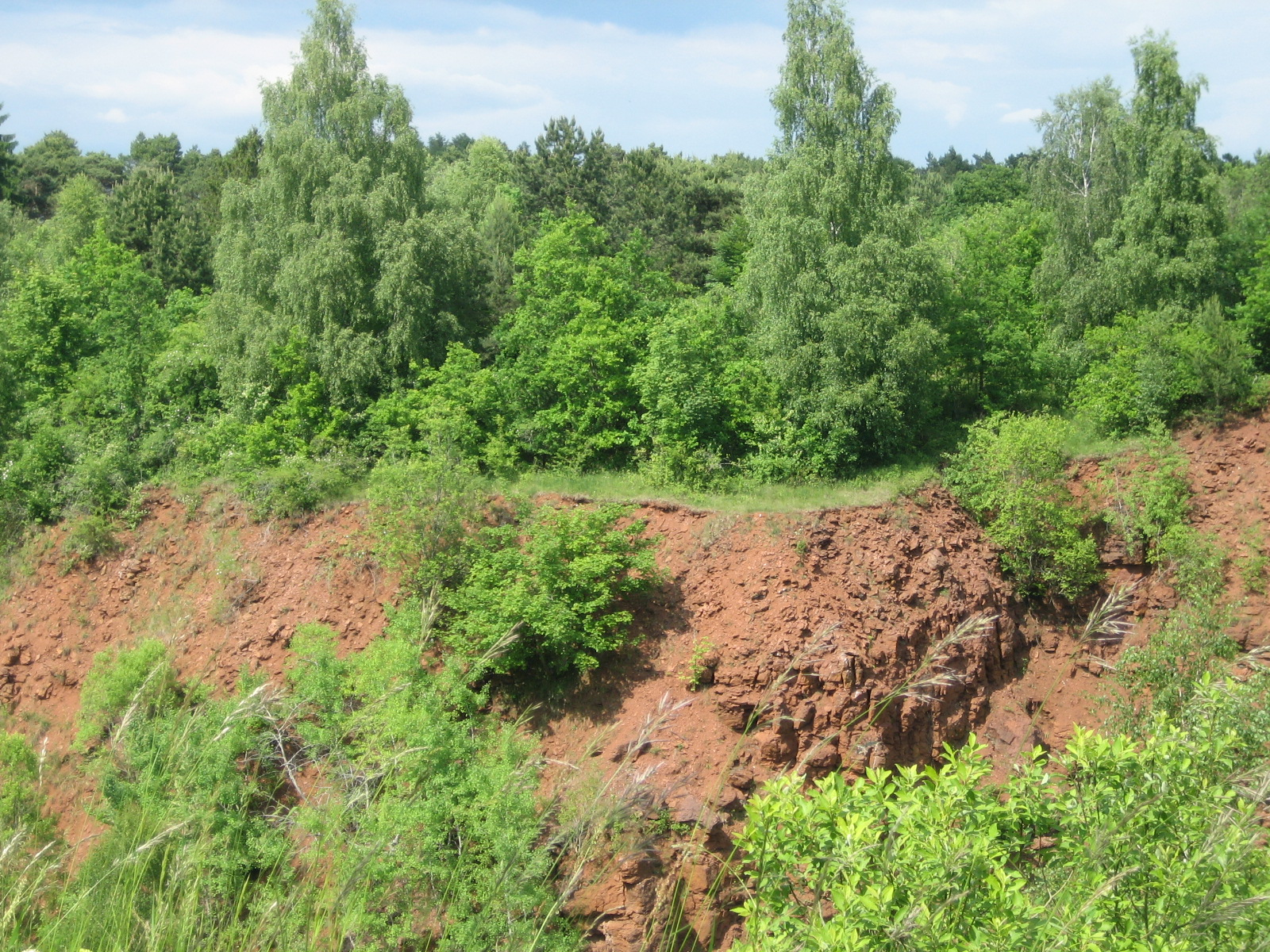 Sujet: Bësch am Minett, an engem fréieren Tagebaugebitt um Leesbierg, tëscht dem Escher Gaalgebierg an dem Burgronn. Auteur: user:zinneke, 31. Mee 2009 Lizenzéieren Kategorie:Esch-Uelzecht